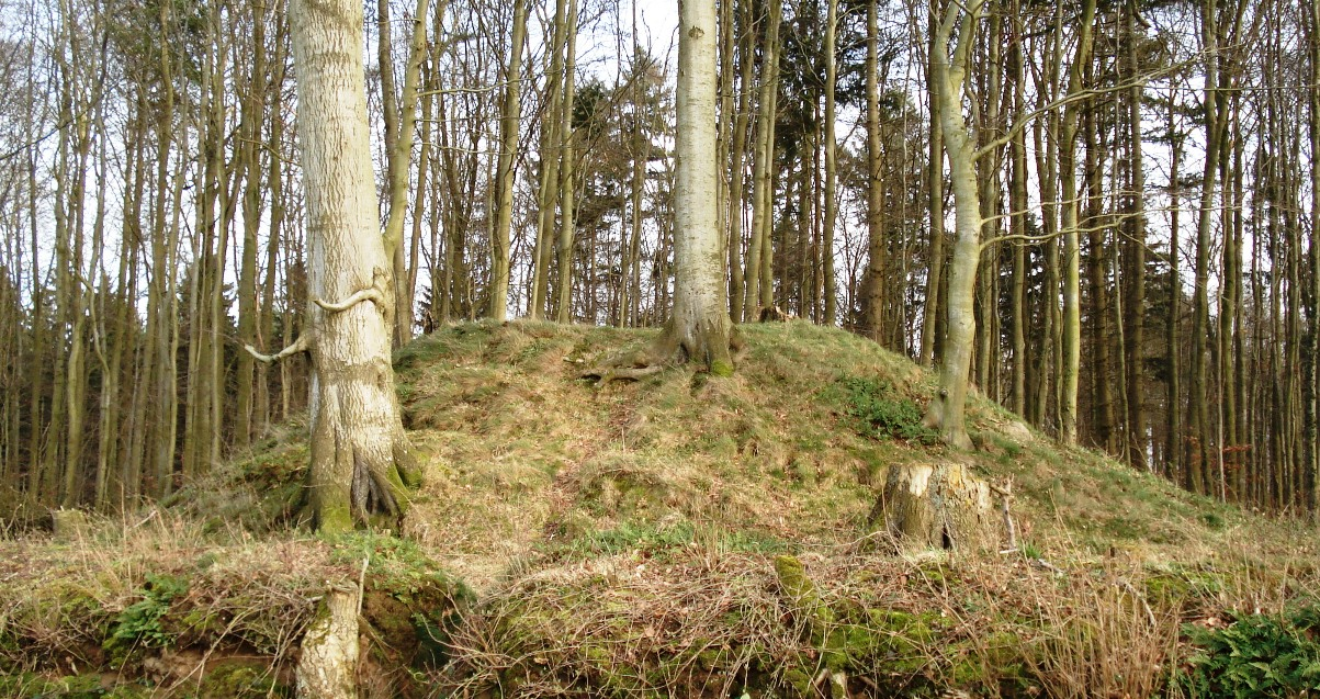 Nördlicher Grabhügel bei Stubbenberg - West